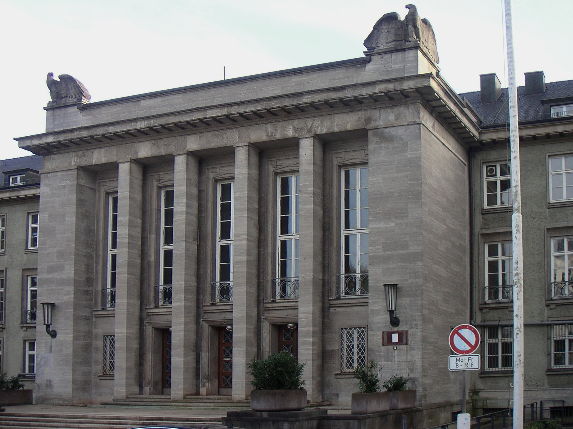 Hamburg, Sophienterrasse 14, Ehemalige Wehrbereichsverwaltung This is a photograph of an architectural monument.